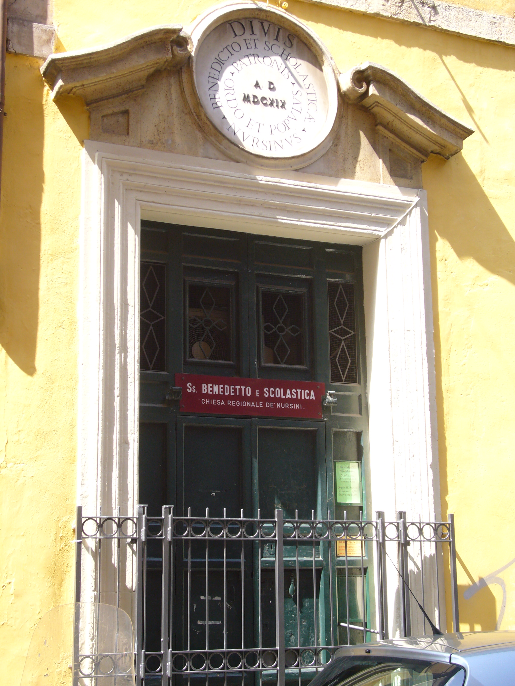 Roma, via della Torre Argentina, oratorio dei Nursini (santi Benedetto e Scolastica)